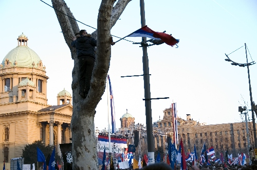 Protest "Kosovo is Serbia"